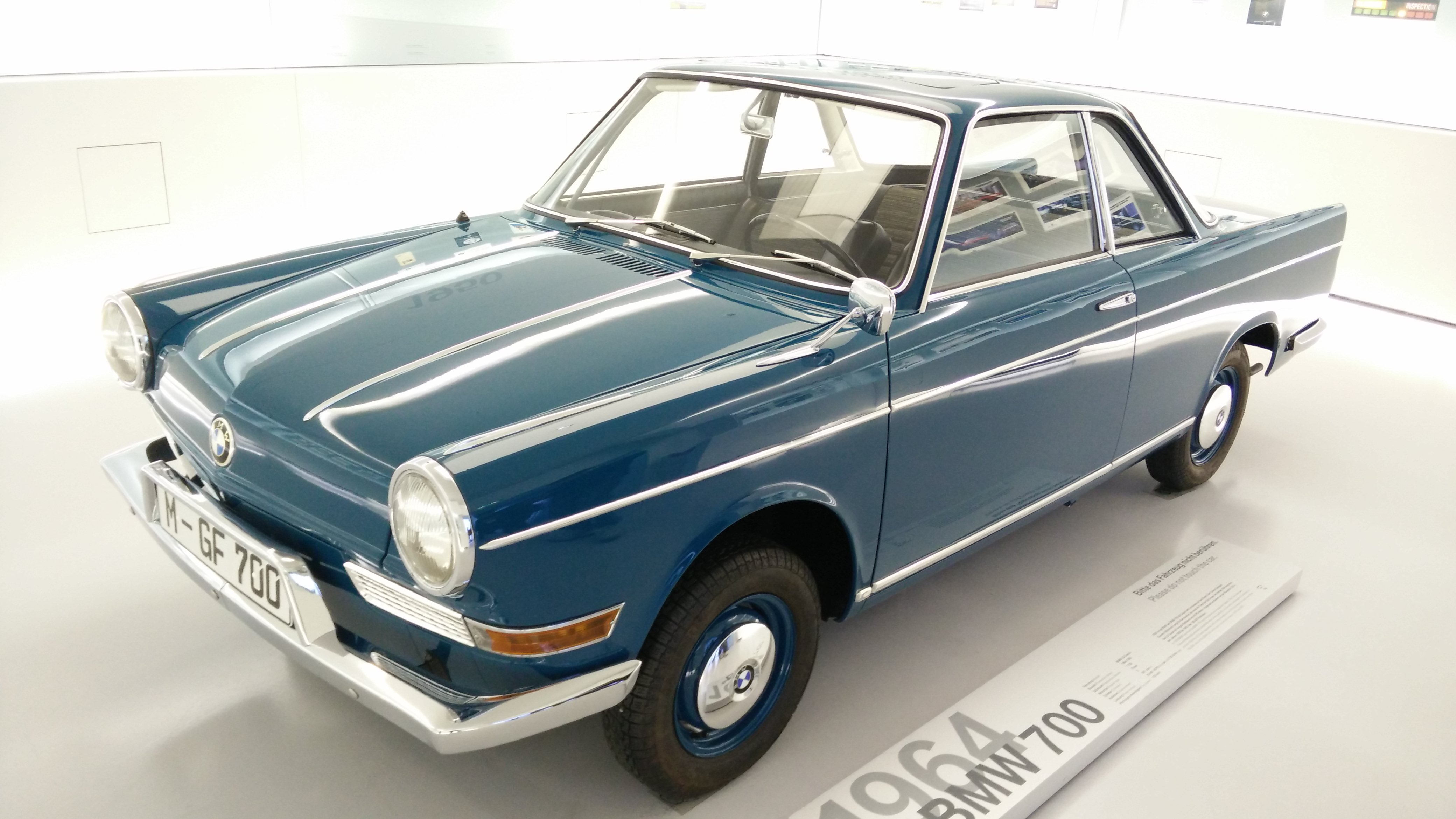 IMG_20141113_110759